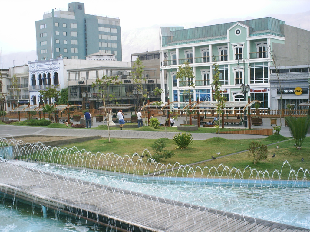 Plaza Prat de Iquique, Casco Antiguo de Iquique. Foto de autoria propia tomada desde el hemiciclo del teatro de iquique, año 2005.